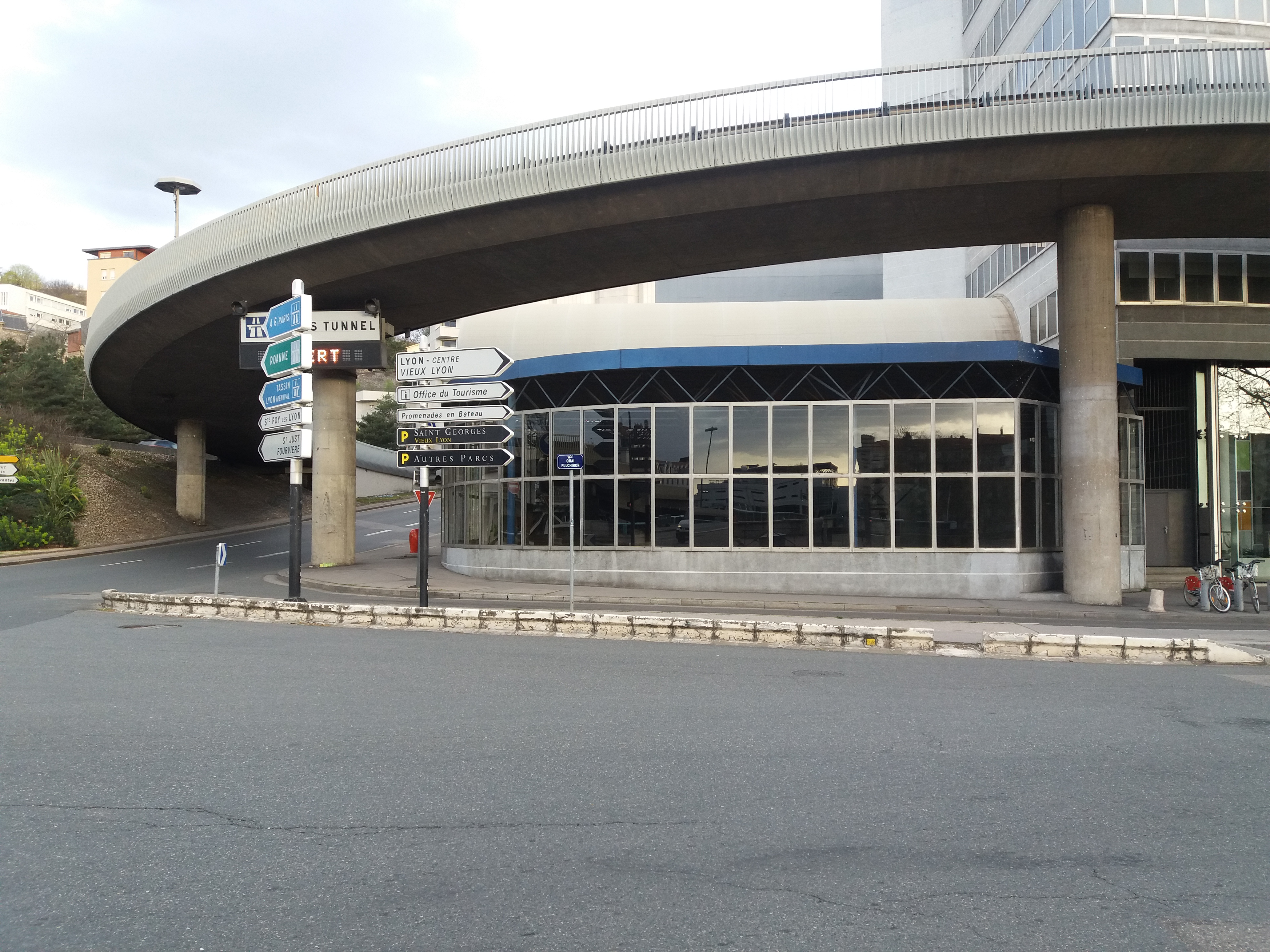 Bâtiment abritant la basilique Saint-Laurent de Choulans, sous la bretelle d'accès au tunnel de Fourvière.